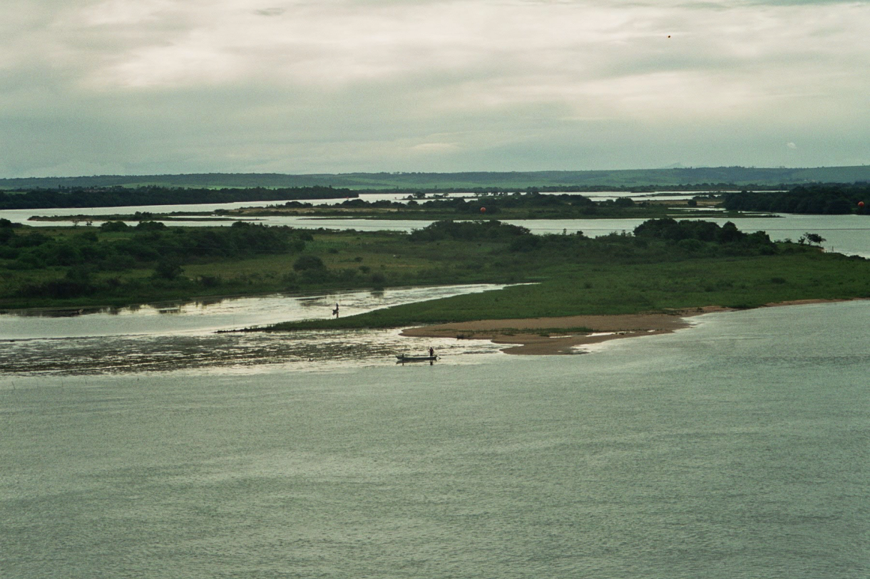 Rio São Francisco, seen from Penedo. June 2006.